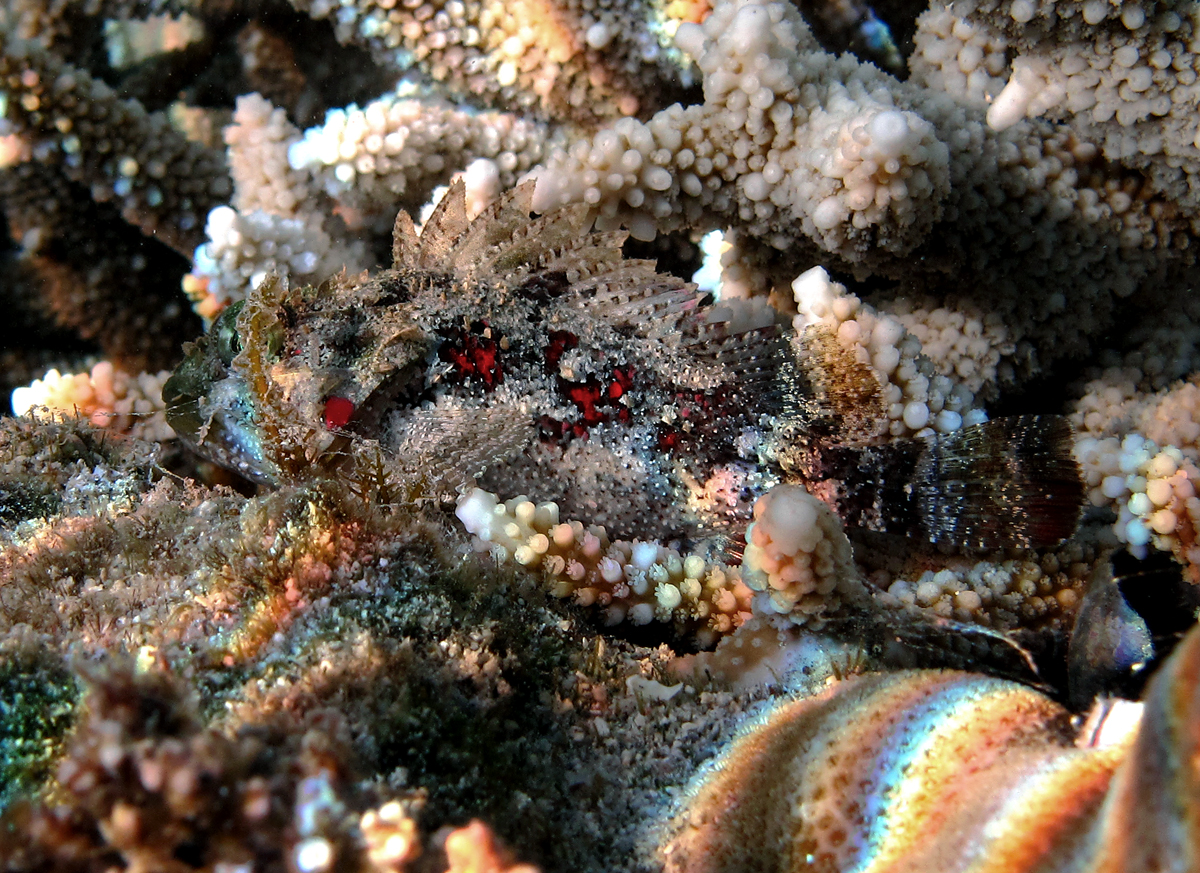 Un Sebastapistes mauritiana à la Réunion.